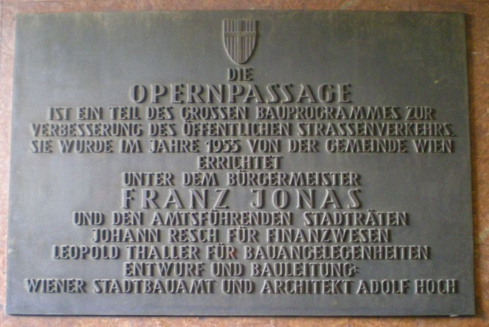 Gedenktafel aus Anlass der Eröffnung der Opernpassage unter der Kreuzung Opernring / Kärntner Straße in Wien